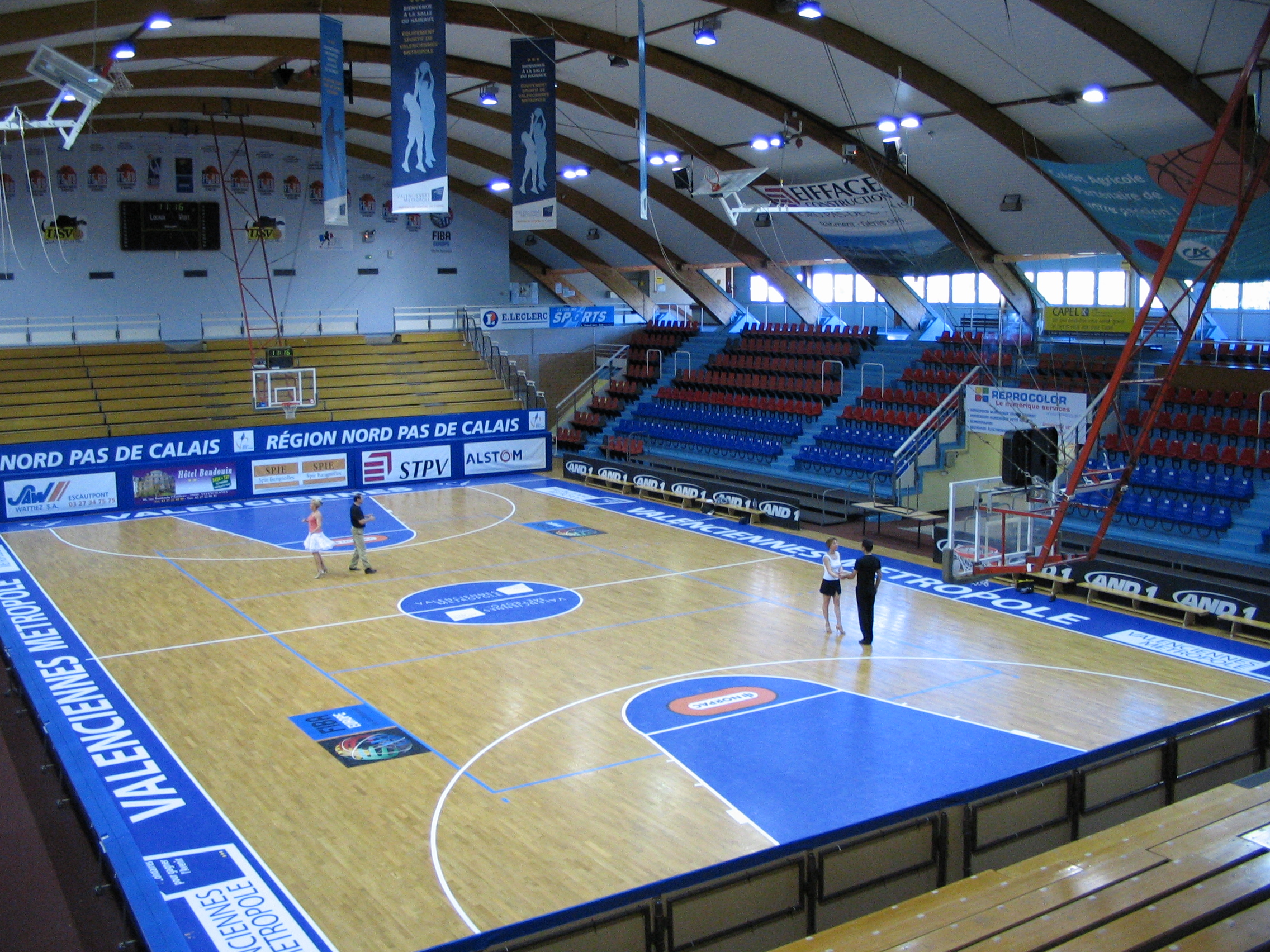 Intérieur.